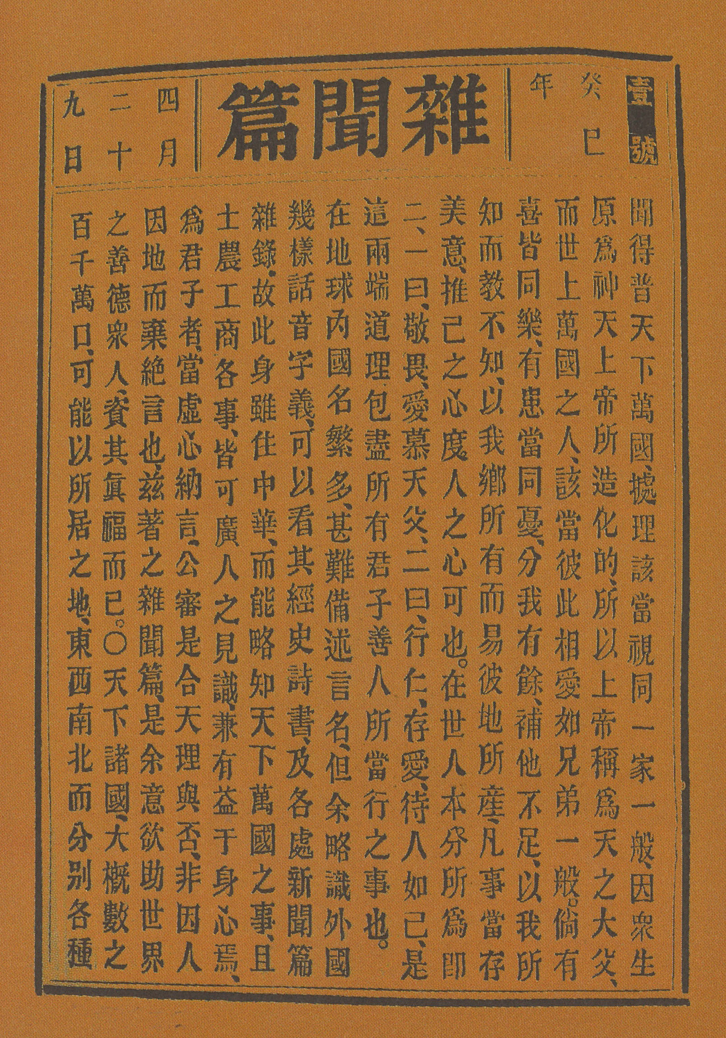 《雜聞篇》創刊號